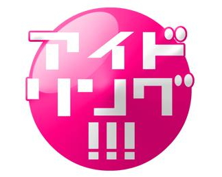 アイドリング!!!ロゴマーク